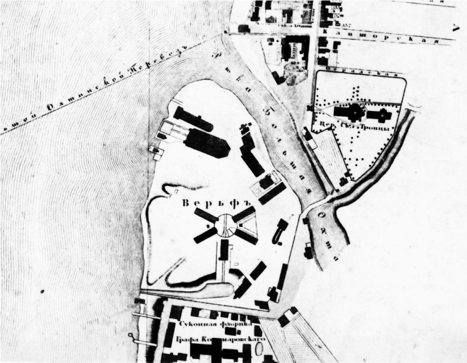 Охтенская верфь и Паноптический институт